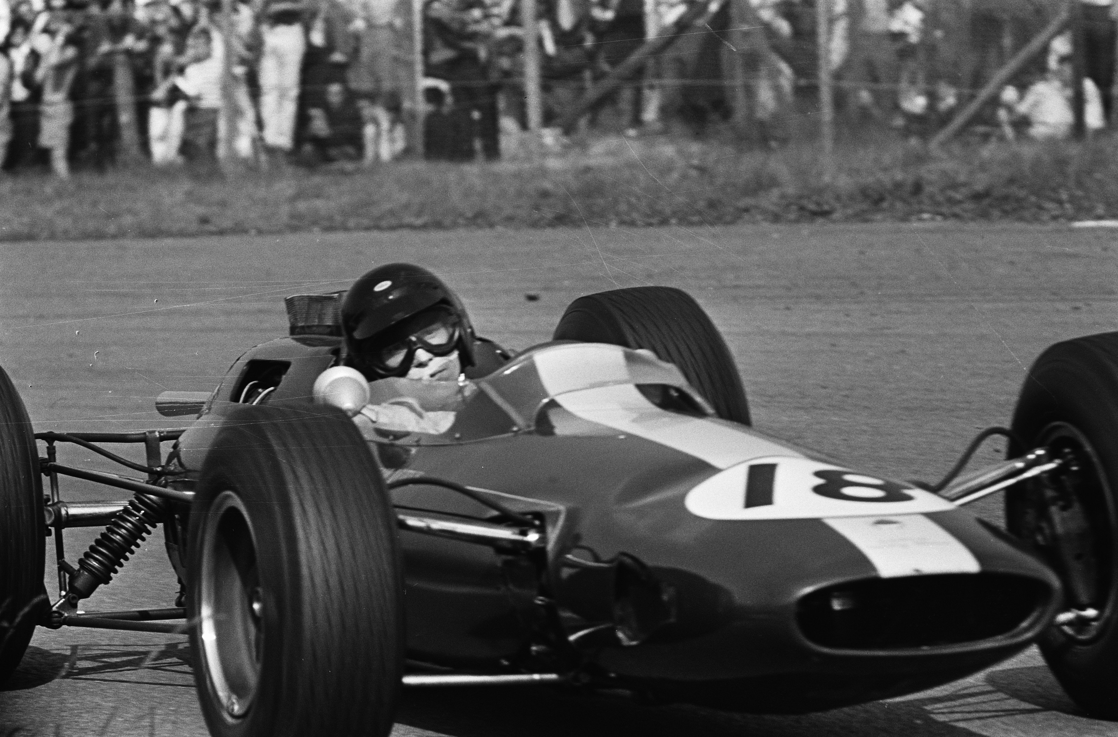 Grand Prix van Nederland, het rennersveld Jim Clark.